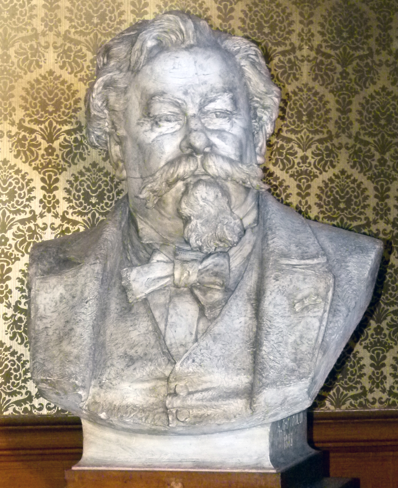 Büste von Gustave Jundt im Bartholdi-Museum in Colmar. Gustave Adolphe Jundt (* 21. Juni 1830 in Straßburg; † 1884) war ein elsässischer Landschafts- und Genremaler, Karikaturist, Graveur und Illustrator. Er ist vor allem für seine elsässischen Genreszenen bekannt.